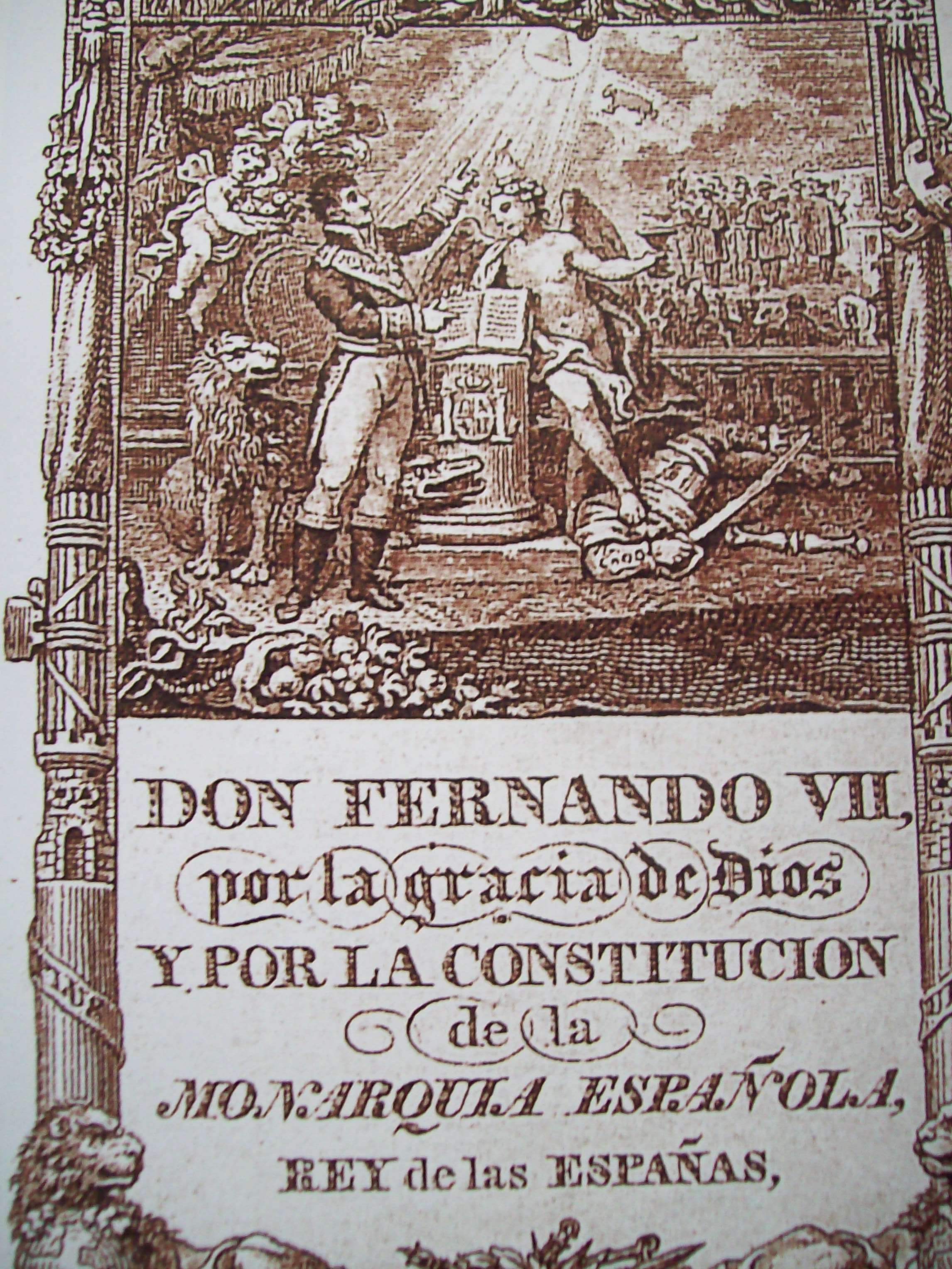 Constitución de Cádiz 1812. Frontipicio de la Constitución de Cádiz, 1812. Archivo del Congreso de los Diputados. Madrid. Fuente: Memoria de las revoluciones en México N°5 (2009) ISBN 978-607-7748-04-5